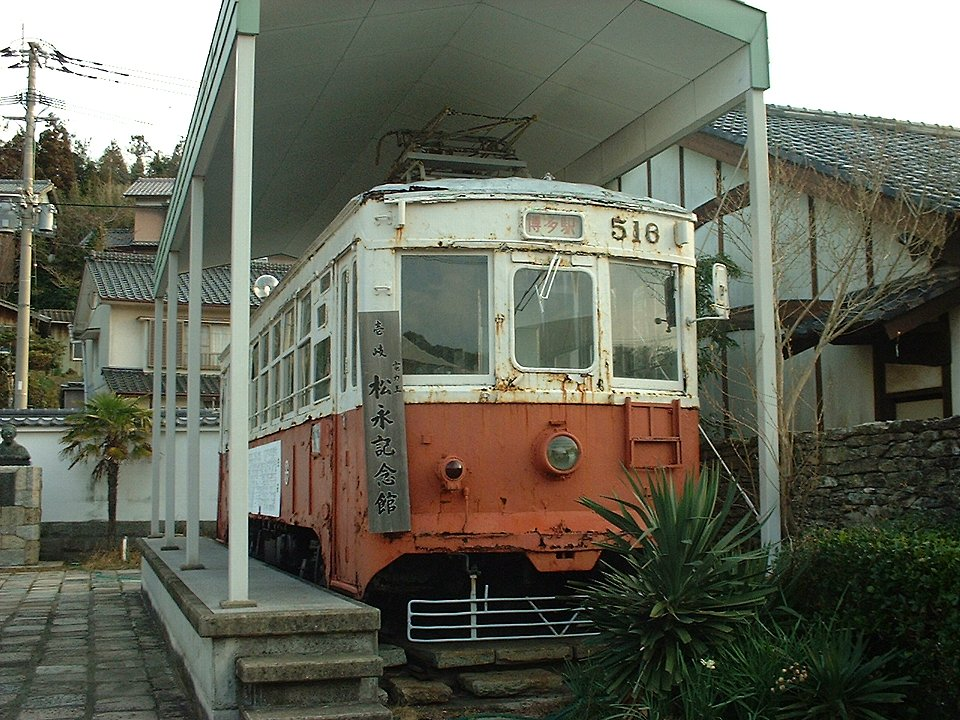 西鉄福岡市内線516号（壱岐島の松永記念館に保存）